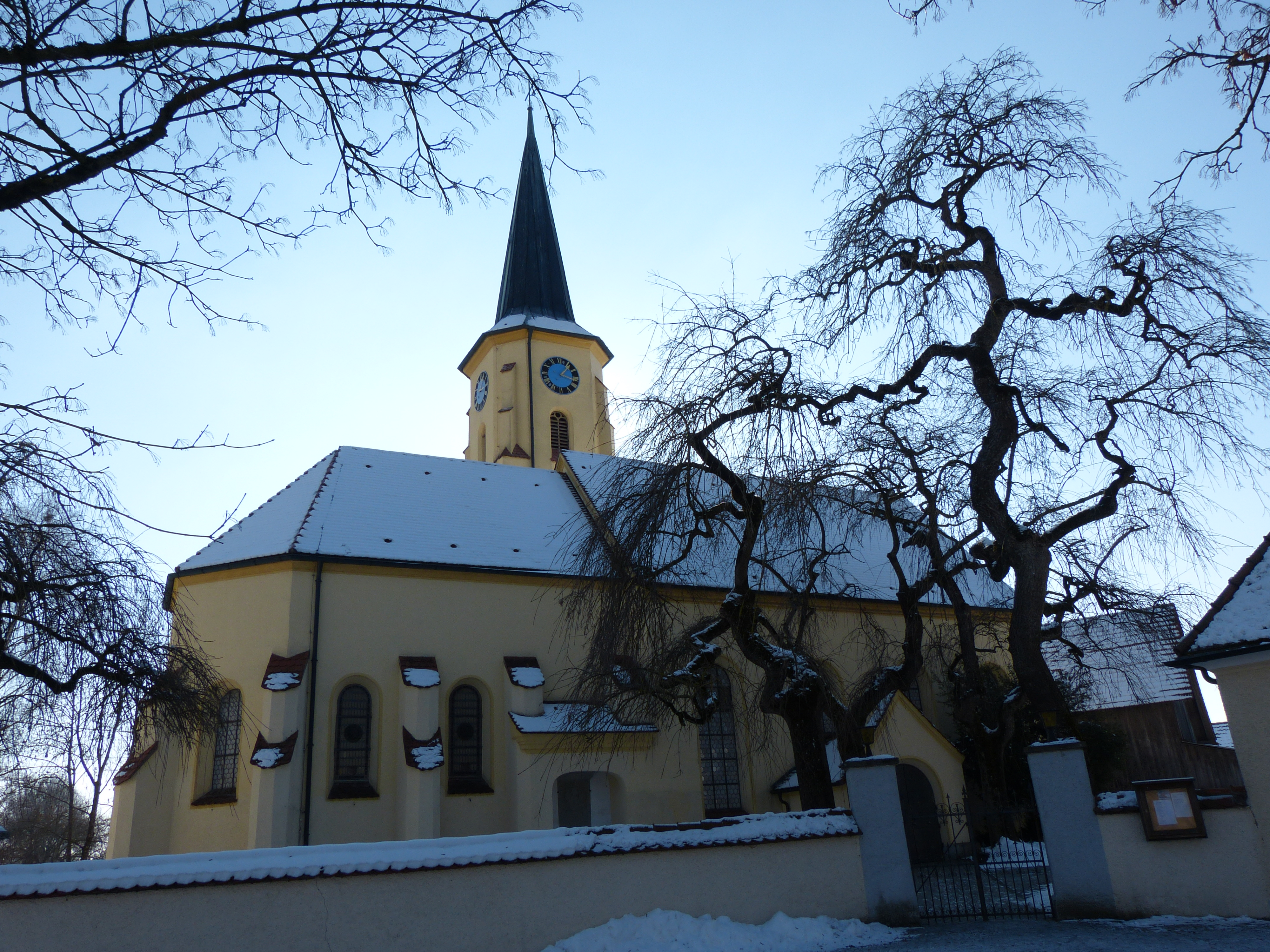 St. Gordian und Epimachus, Gemeinde Memmingerberg, Landkreis Unterallgäu, Bayern